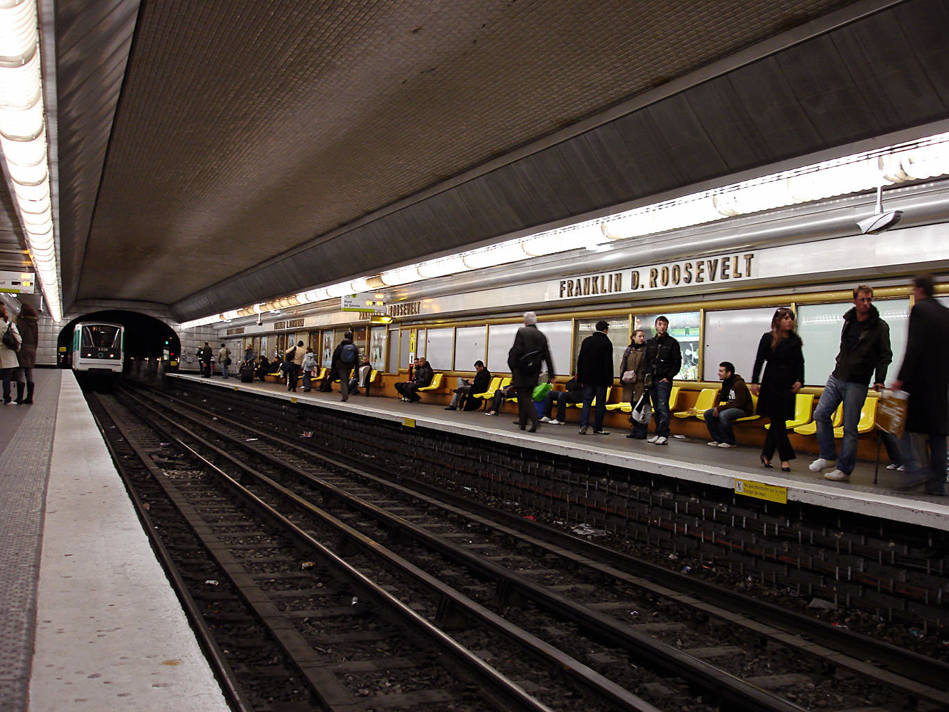 La station Franklin D. Roosevelt de la ligne 9 du métro de Paris, France